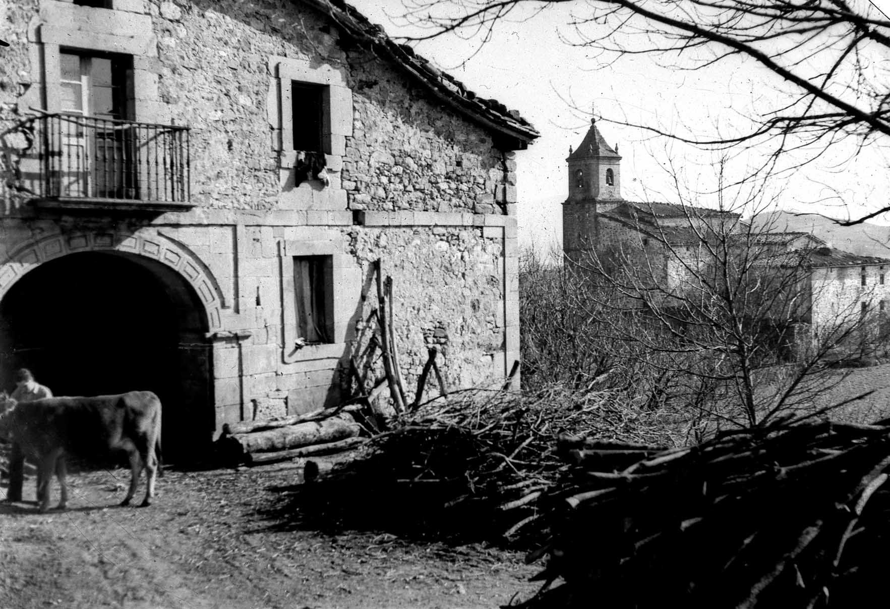 Bedoña auzoko Uribarri baserriaren sarrera. Atzekaldean eliza ikus daiteke.Argazkia Gipuzkoako Foru Aldundiko Kultura eta Euskara Departamentuaren atarian eskuratu dauteke